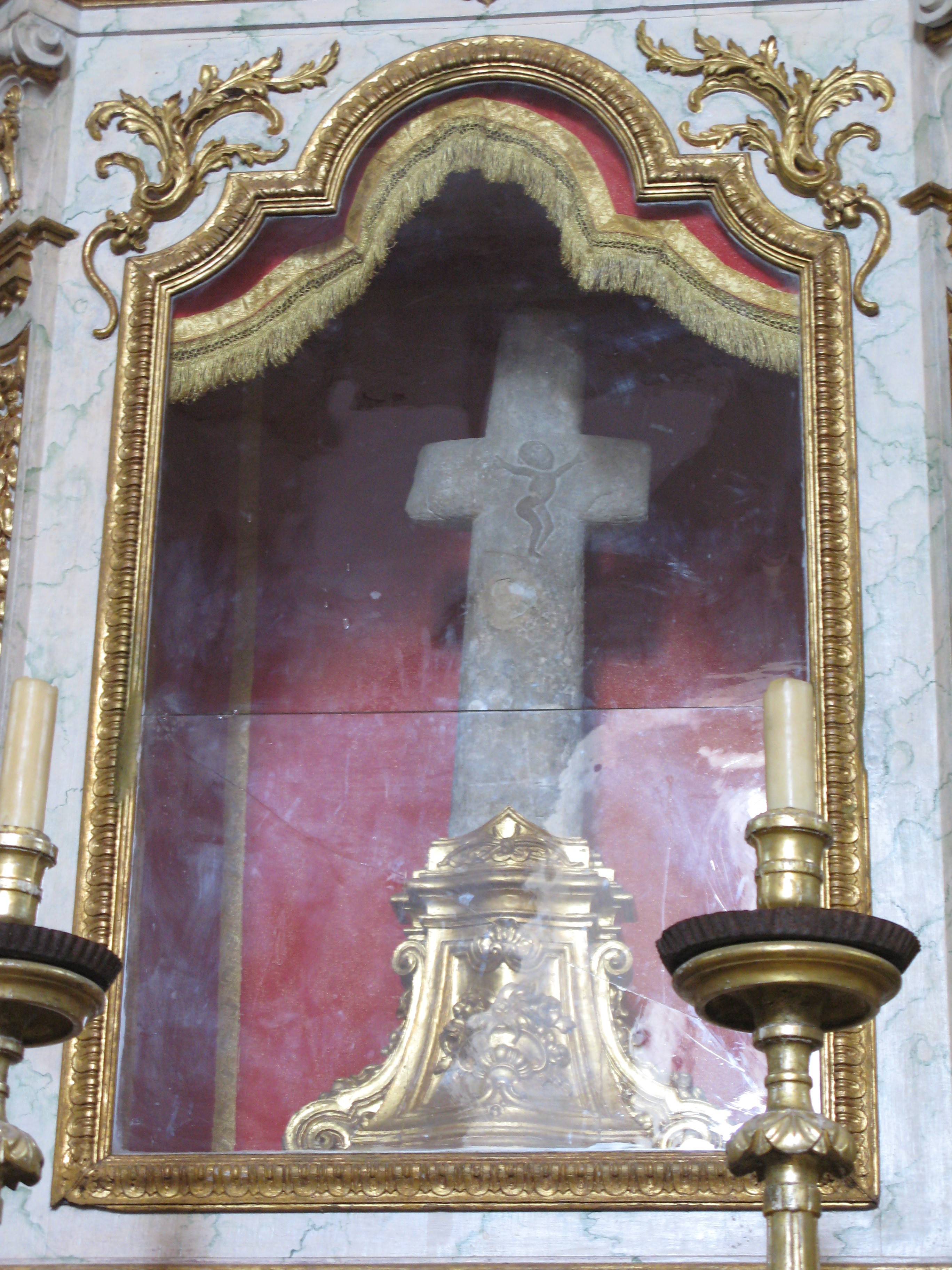 Portogallo 2007, Obidos